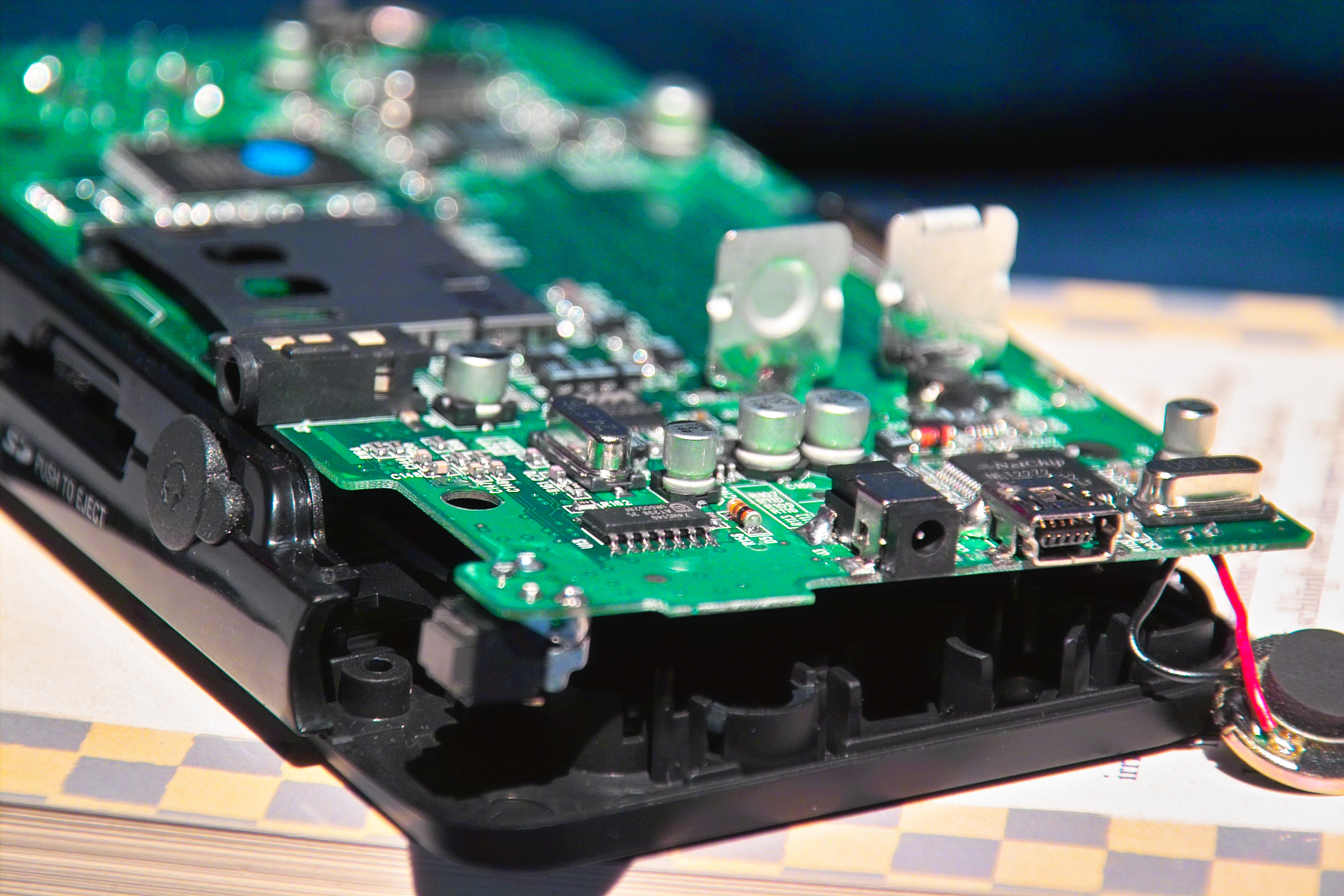 Die Kopfhörerbuchse des GP2X